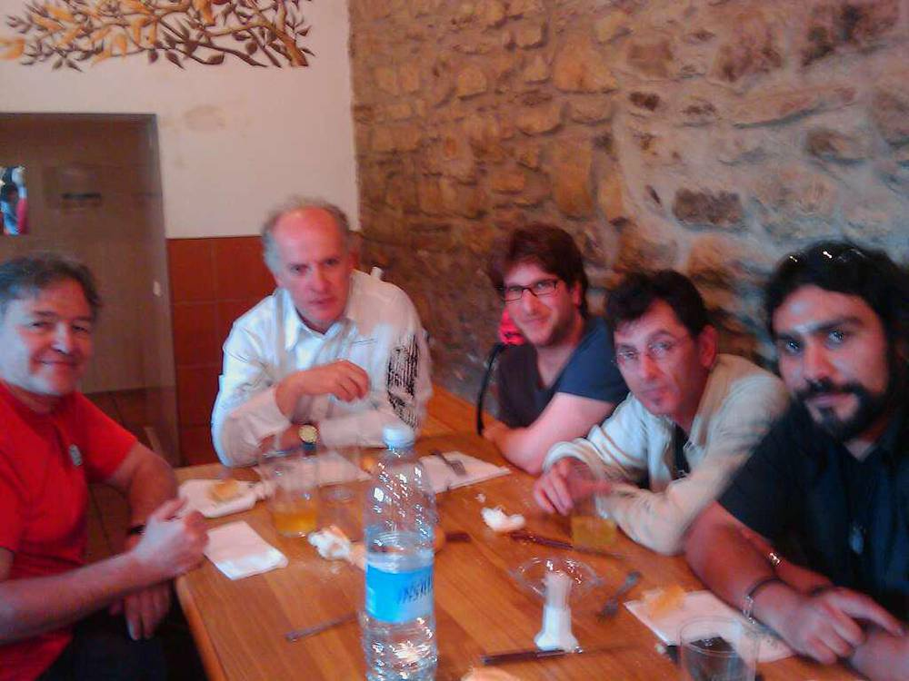 Comida de agradecimiento-celebración tras absolución caso Egunkaria. Junto a director Martxelo Otamendi, personas del grupo de solidaridad de Madrid; Miguel Urbán 3o por la derecha.